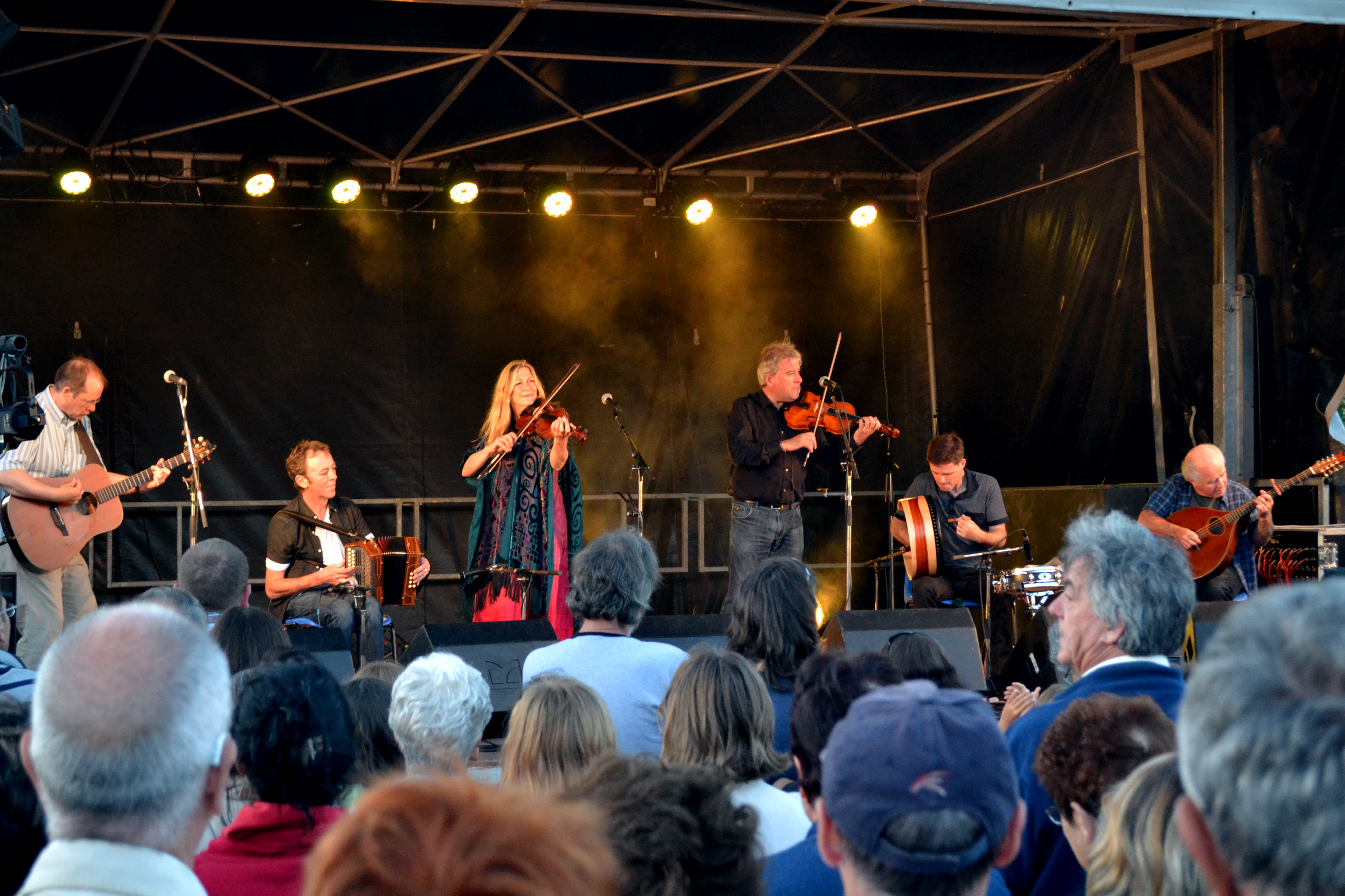 Le groupe irlandais de musique traditionnelle Altan en concert lors des Mardis de Plouescat (Nord Finistère, Bretagne, France) le 23 juillet 2013.